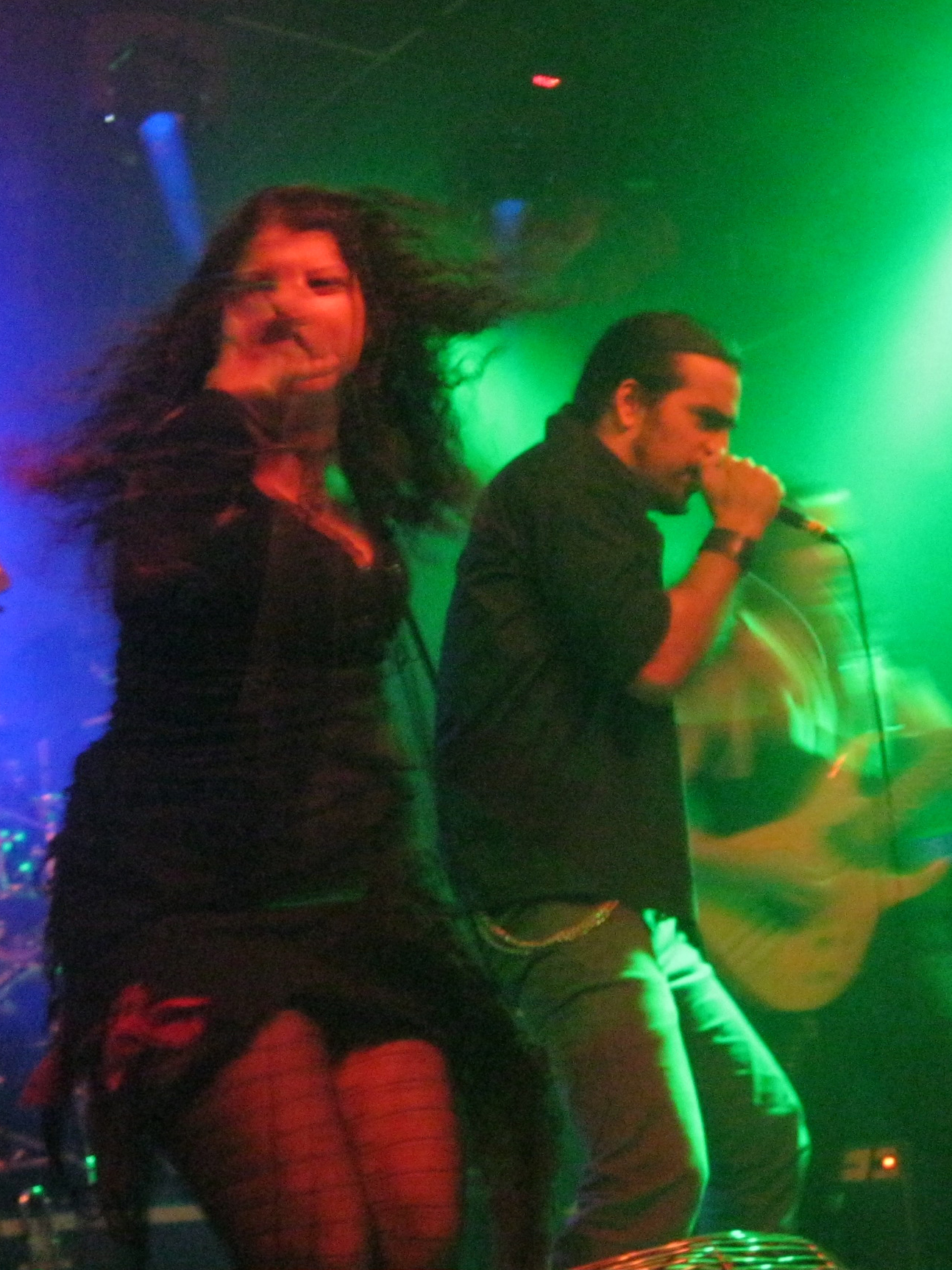 Orpheus Blade